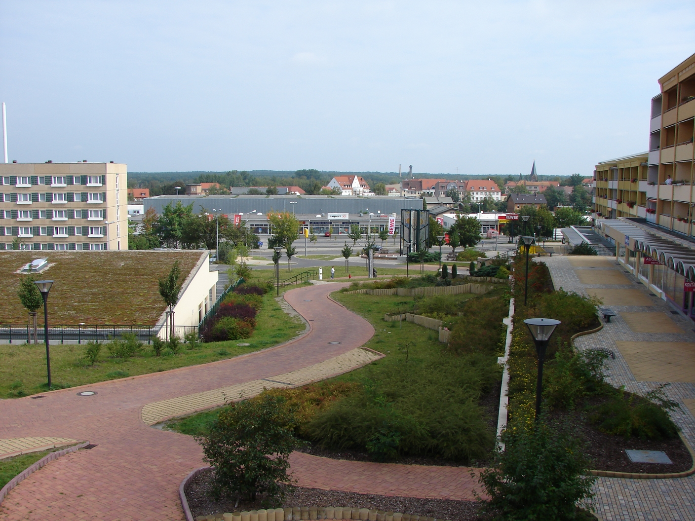 Blick über den Boulevard der Stadt Weißwasser